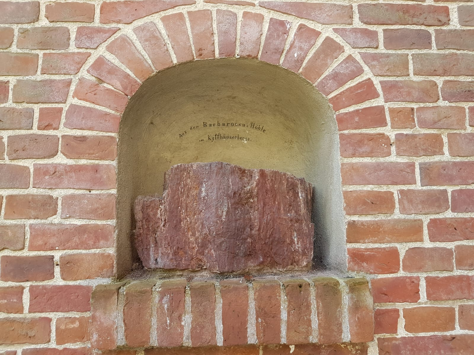 Reliquie des Nationalismus, als Schrein eingelassen in die Umfassungsmauer des Sielhofes bei Neuharlingersiel.Stein aus der Barbarossa-Höhle im Kyffhäuser. Mutmaßlich errichtet von Georg von Eucken-Addenhausen, dem ehemaligen Besitzer des Sielhofes. Der überzeugter Militarist und Monarchist gilt Wegbereiter des Nationalsozialismus in Neuharlingersiel.